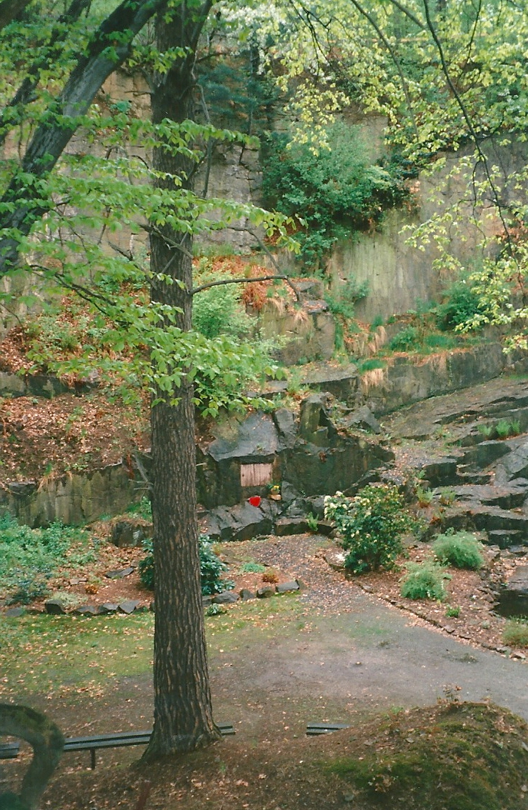 Gabstätte Wilhelm Ostwald im Park seines Landsitzes "Energie" in Großbothen